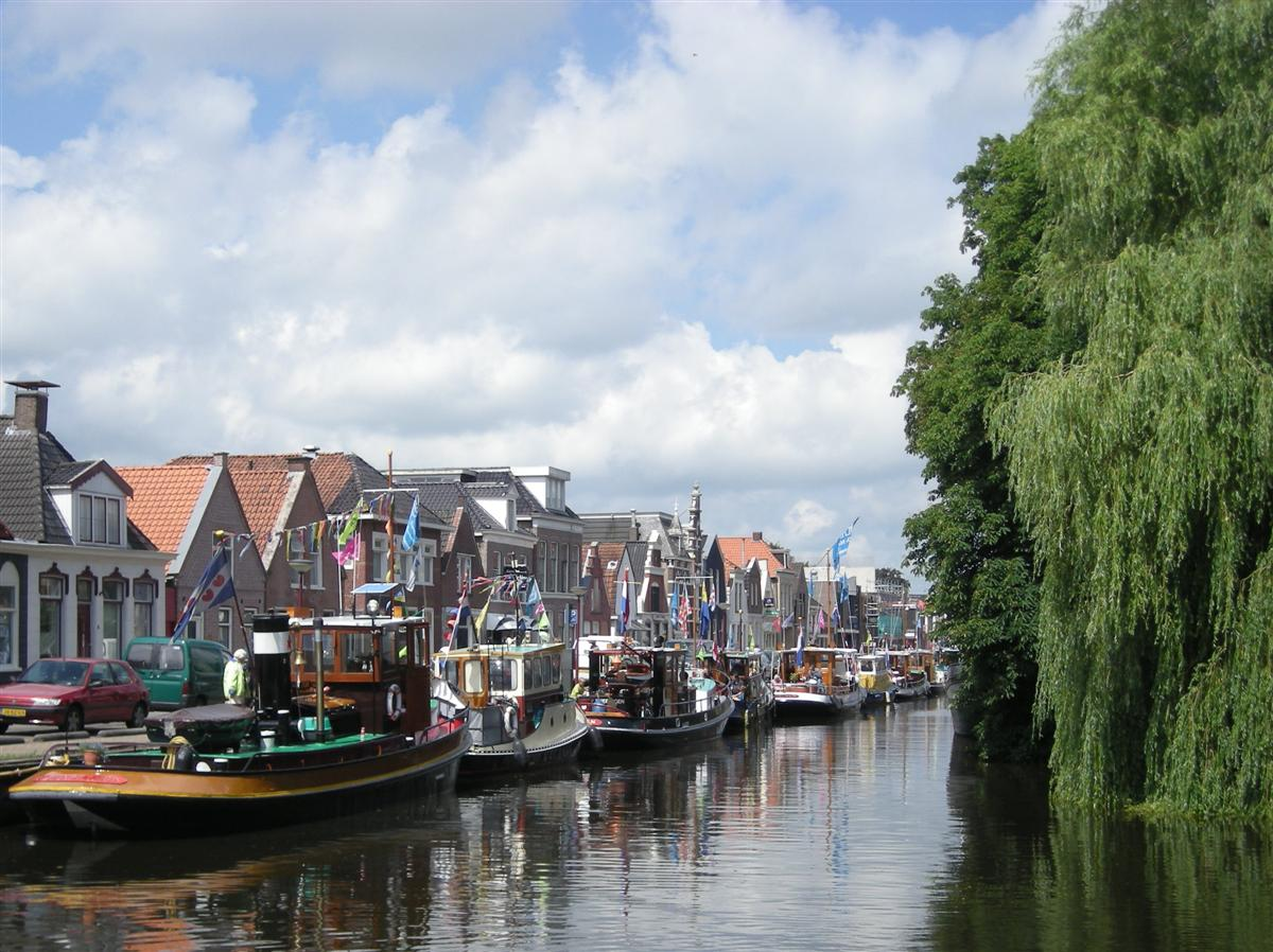 Hearresleat